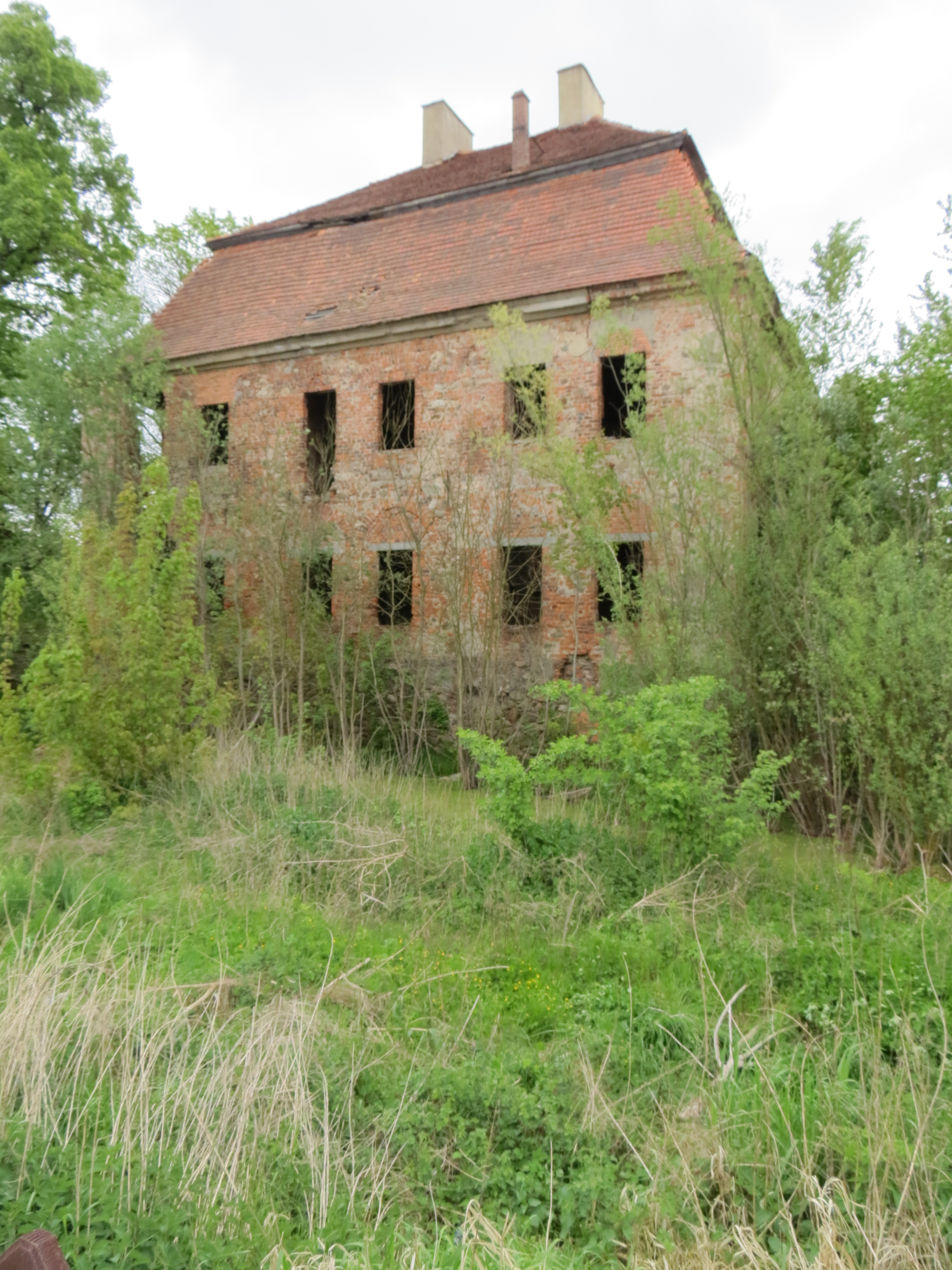 Trzebiel, wieża mieszkalna, XVI